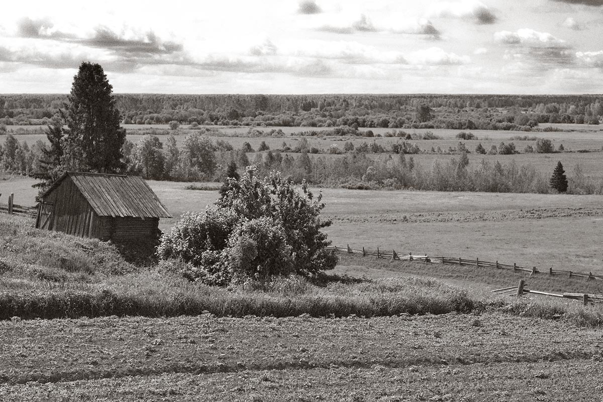 View of the Kama river from Afanasjevo. Вид на Каму из Афанасьево.